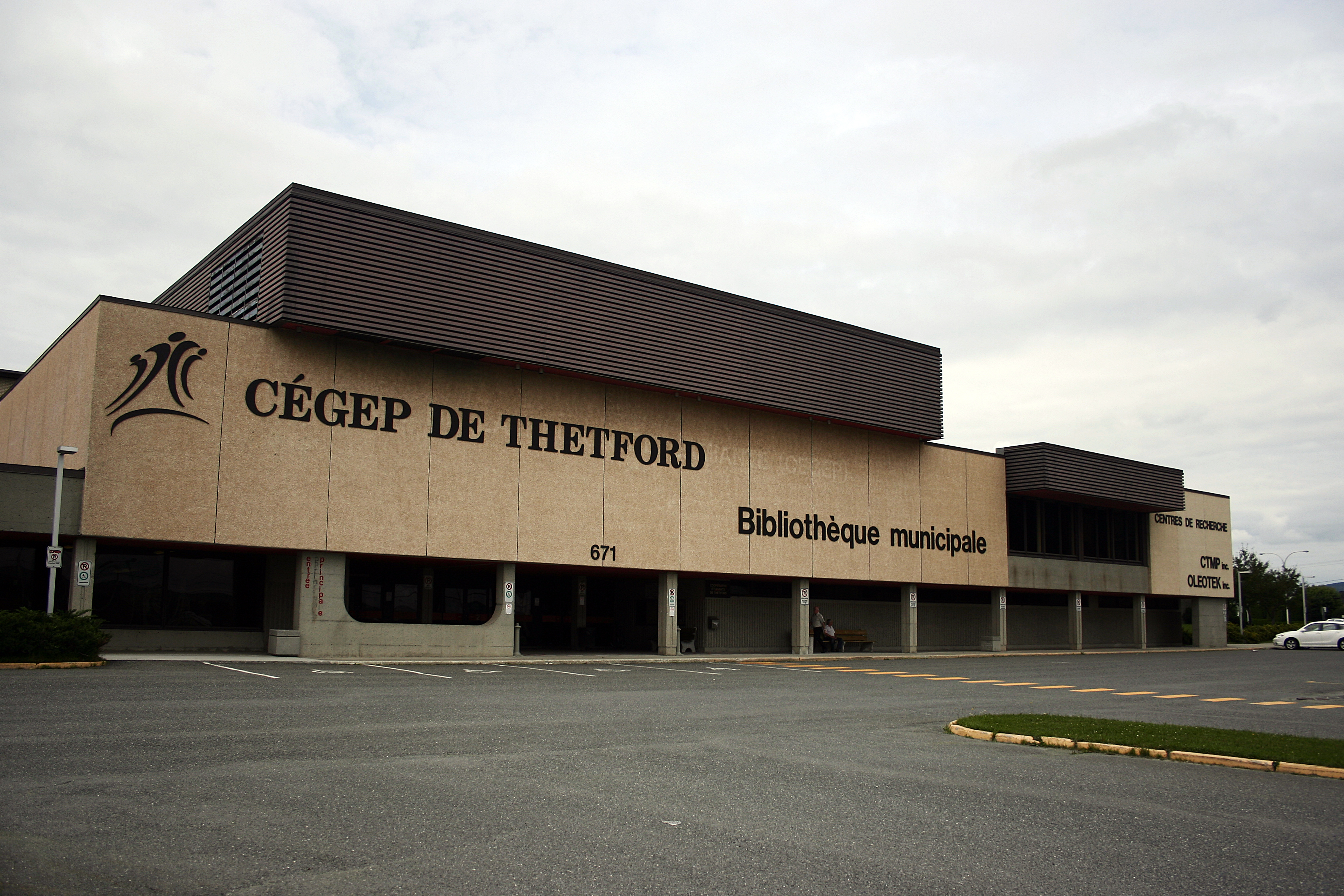 Façade du Cégep de Thetford